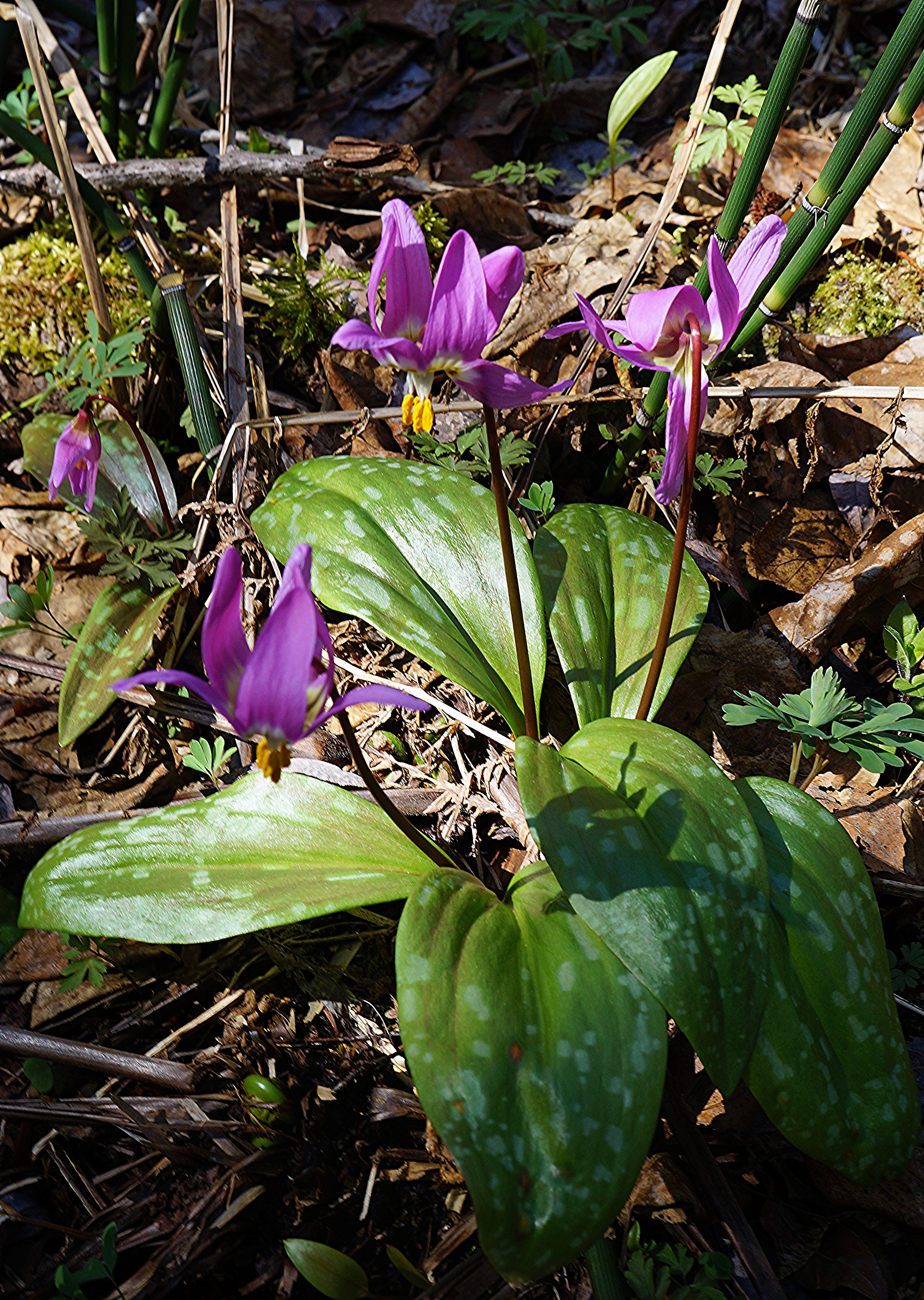 Кандык сибирский произрастает на территории Горного лесничества. Является краснокнижным растением. Фото Элинор Пэйт